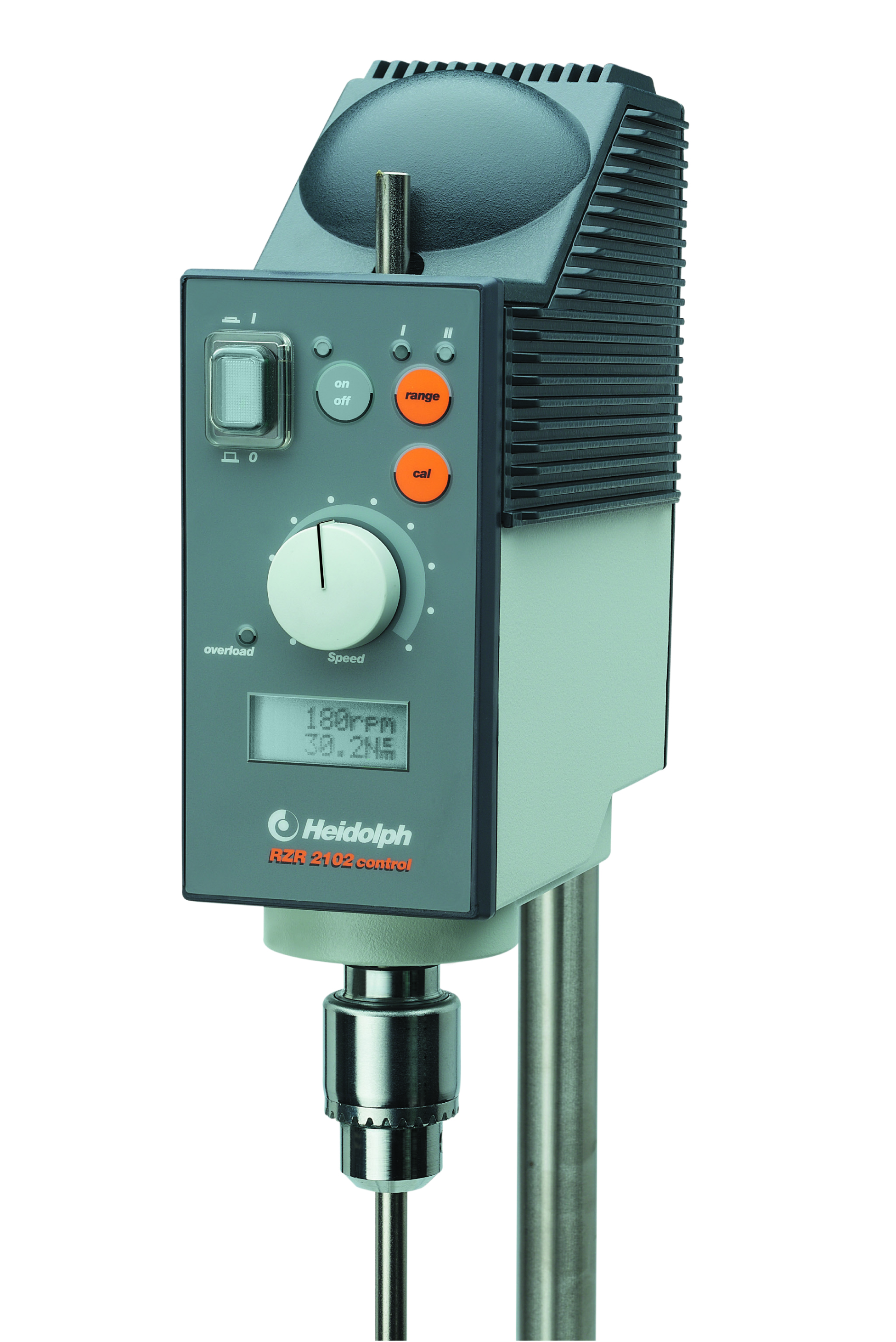 Heidolph RZR Laborrührer